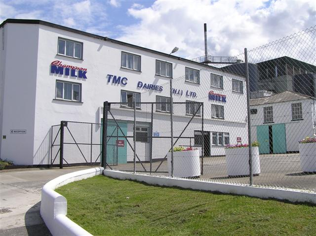 TMC Dairies, Artigarvan